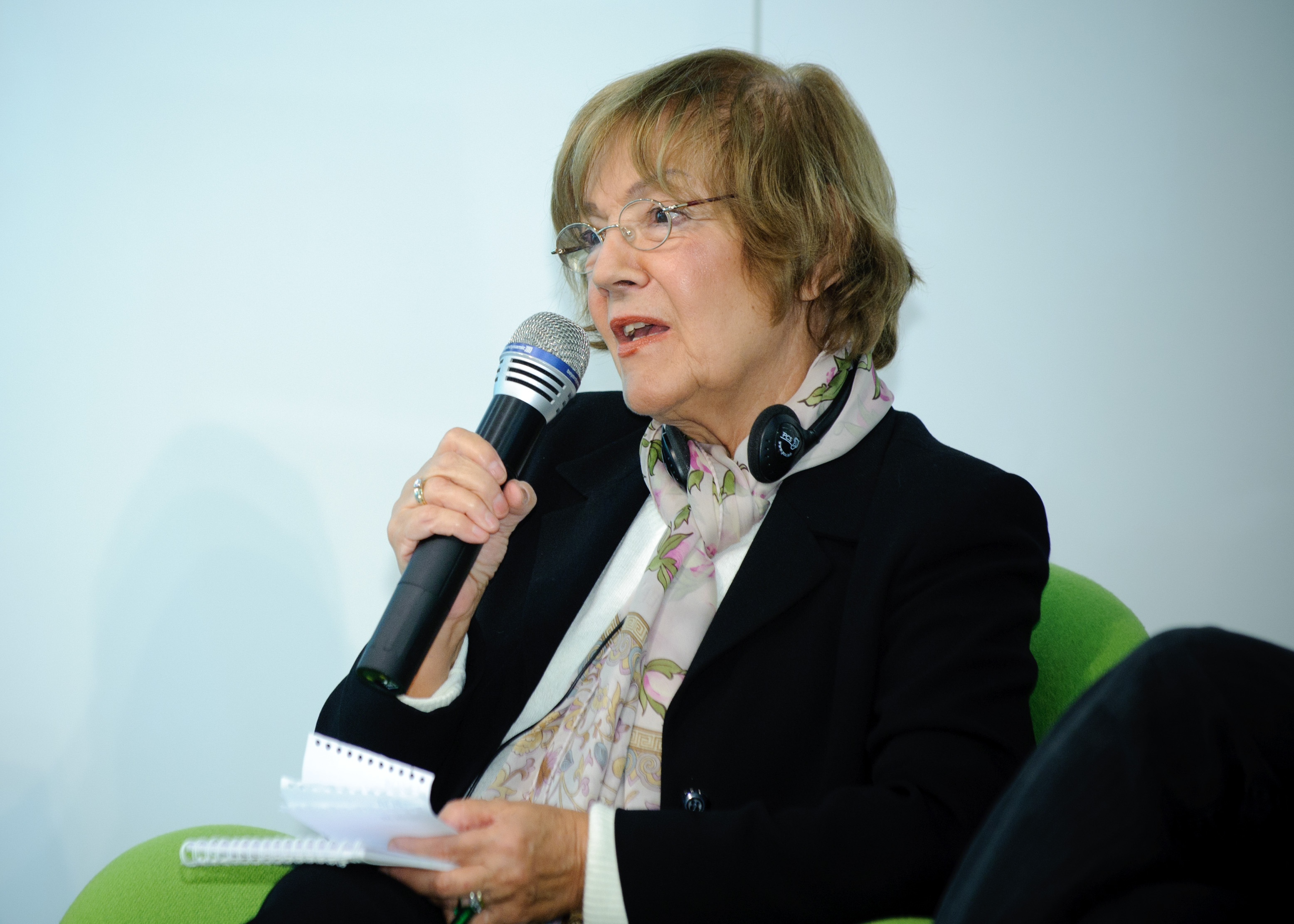 Vesna Pesic (LDP-Abgeordnete im serbischen Parlament - Vorsitzende des Zentrums für Frieden und Demokratieentwicklung - Belgrad) Foto: CC-BY-SA Stephan Röhl /